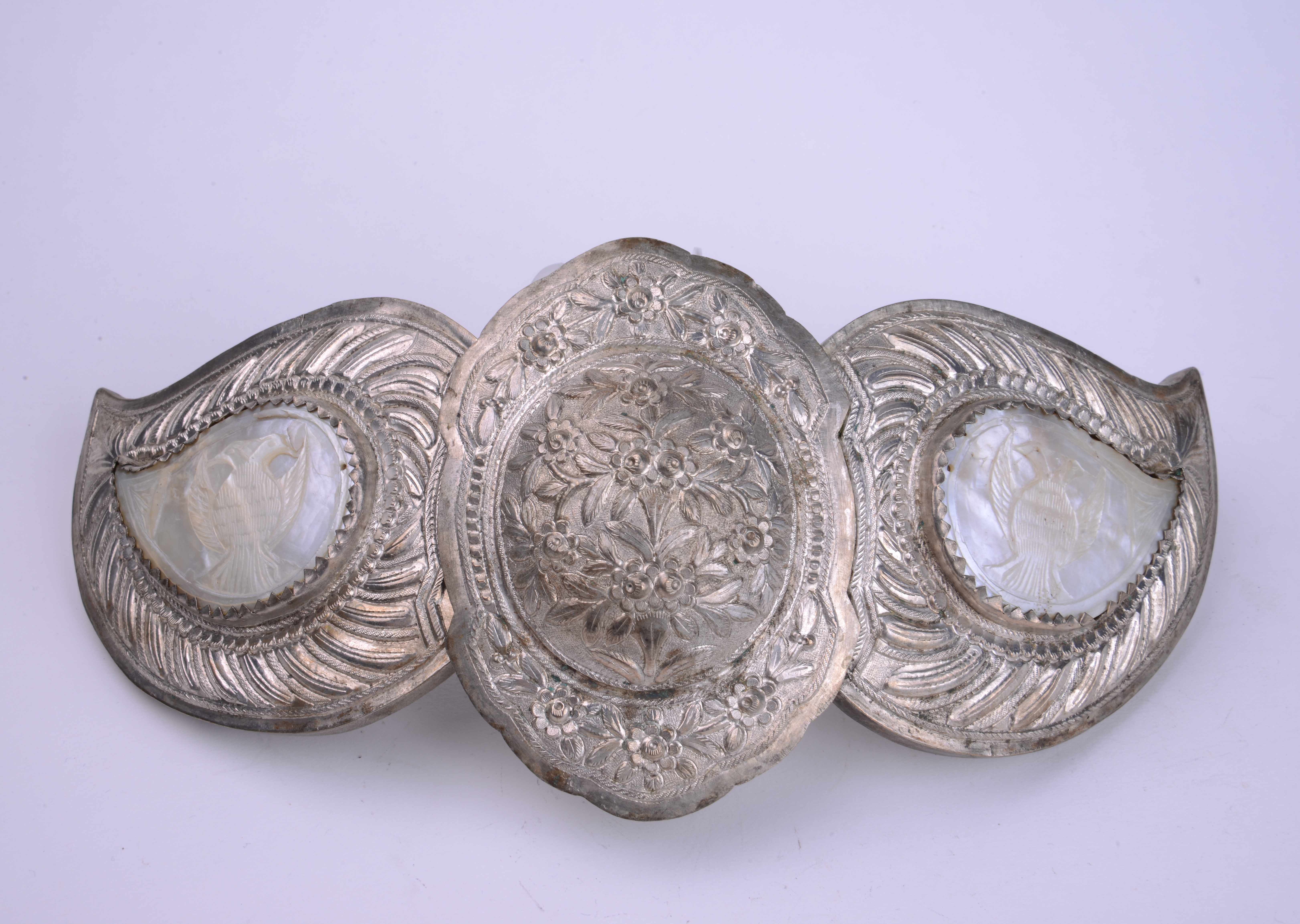 Srpski (latinica): „Pafta“ (kopča) od mesinga iz XIX veka. Otkup od B. Damjanovića iz Leskovca 1964. Godine. Sastoji iz tri dela: dva kraka i središnjeg dela, koji je spojen sa jednim krakom. Sa unutrašnje strane kraka, koji se odvaja, ugravirano je ime Todor Kostić i godina 1912. Deo je zbirke nakita Narodnog muzeja u Leskovcu.